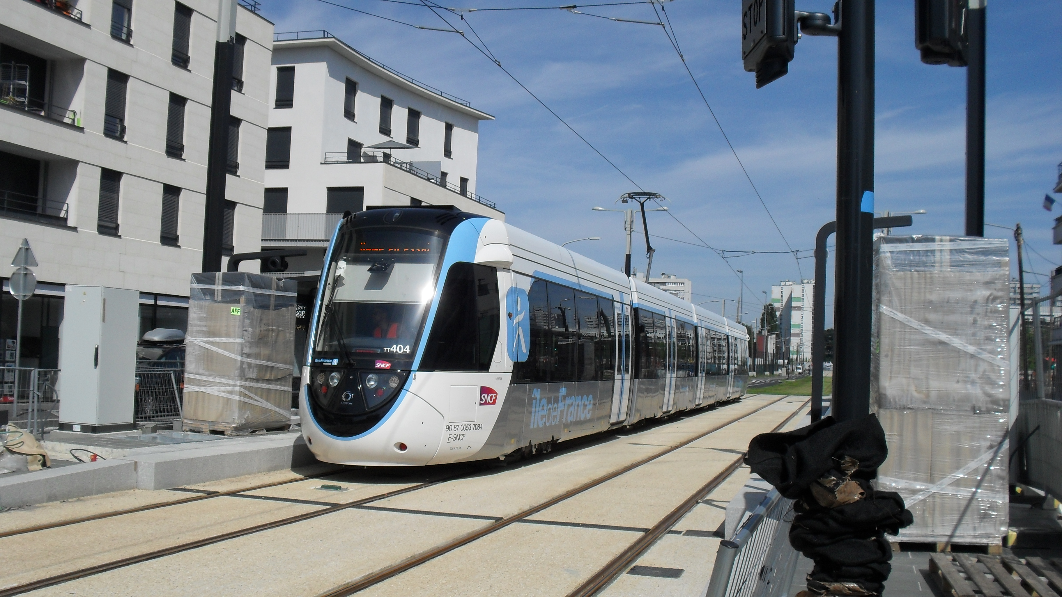 Tram-train U53700 en essais à la future station Notre-Dame des Anges